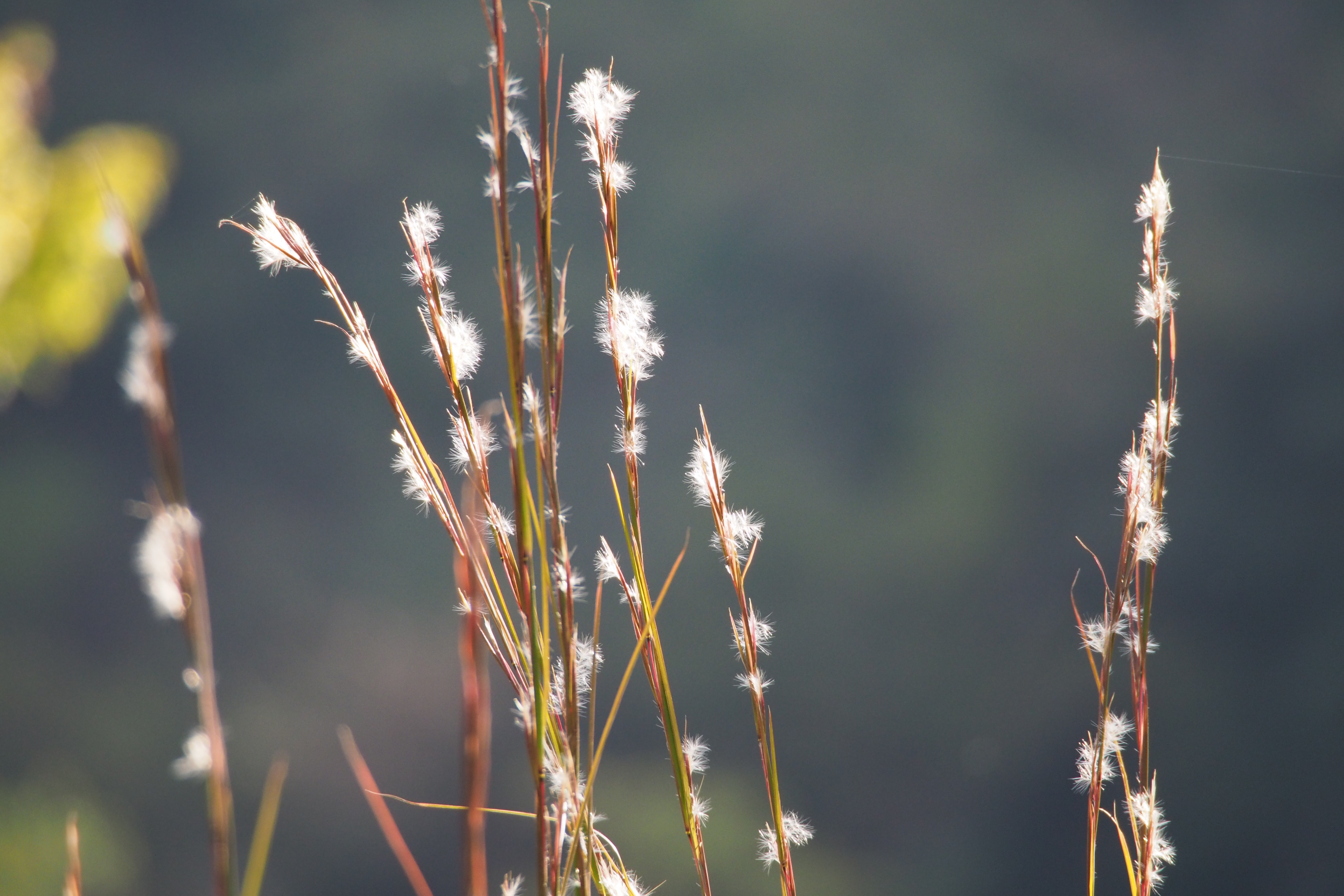 broomsedge bluestem (Andropogon virginicus)